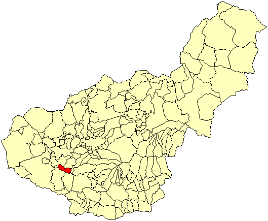 Situación del término municipal de Agrón respecto a la provincia de Granada, en España.